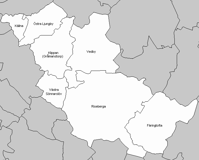 Socken in Klippan